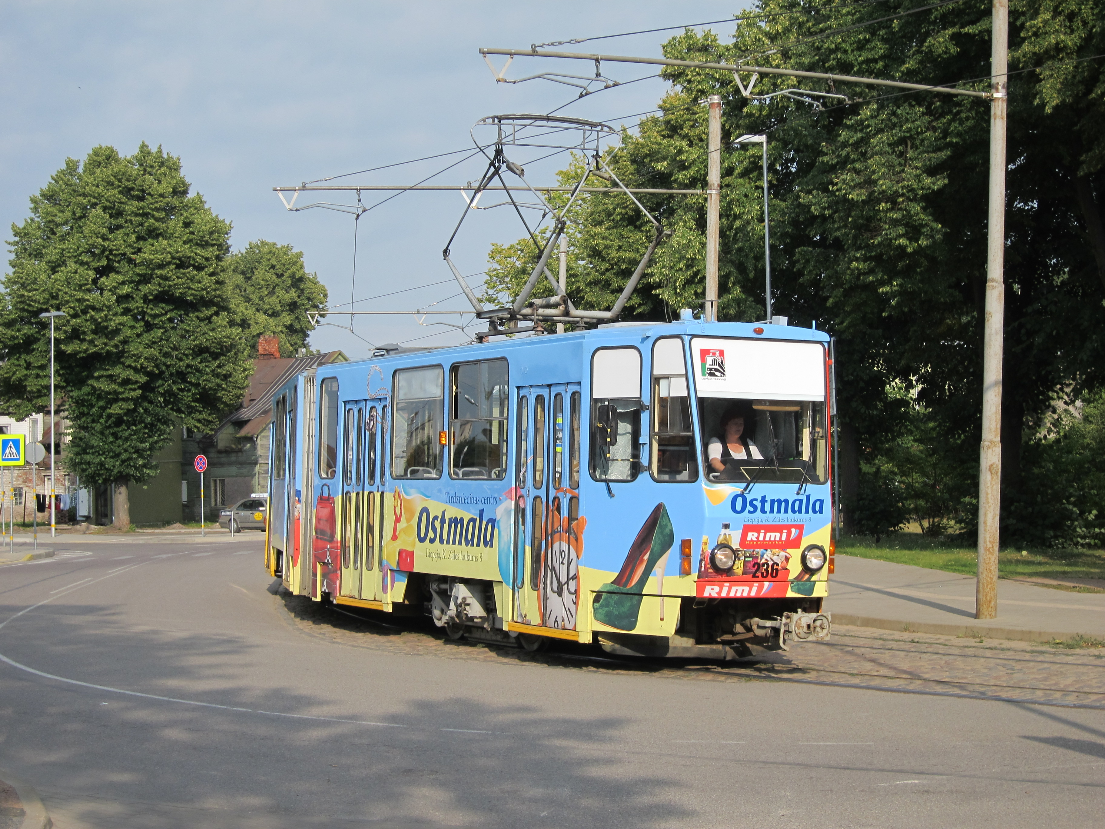 Tramvajs Liepājā pie stacijas